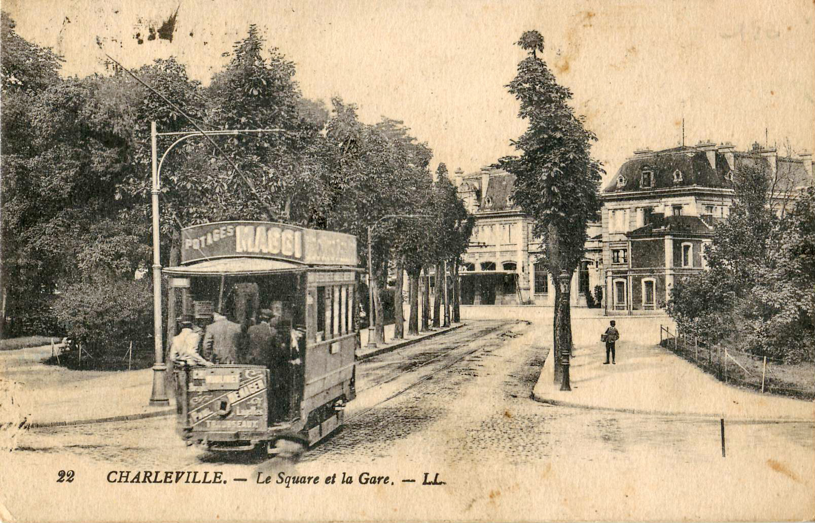 Carte postale ancienne éditée par LL, n°22 :CHARLEVILLE - Le Square et la Gare.Vue d'une motrice du tramway de Charleville-Mézières